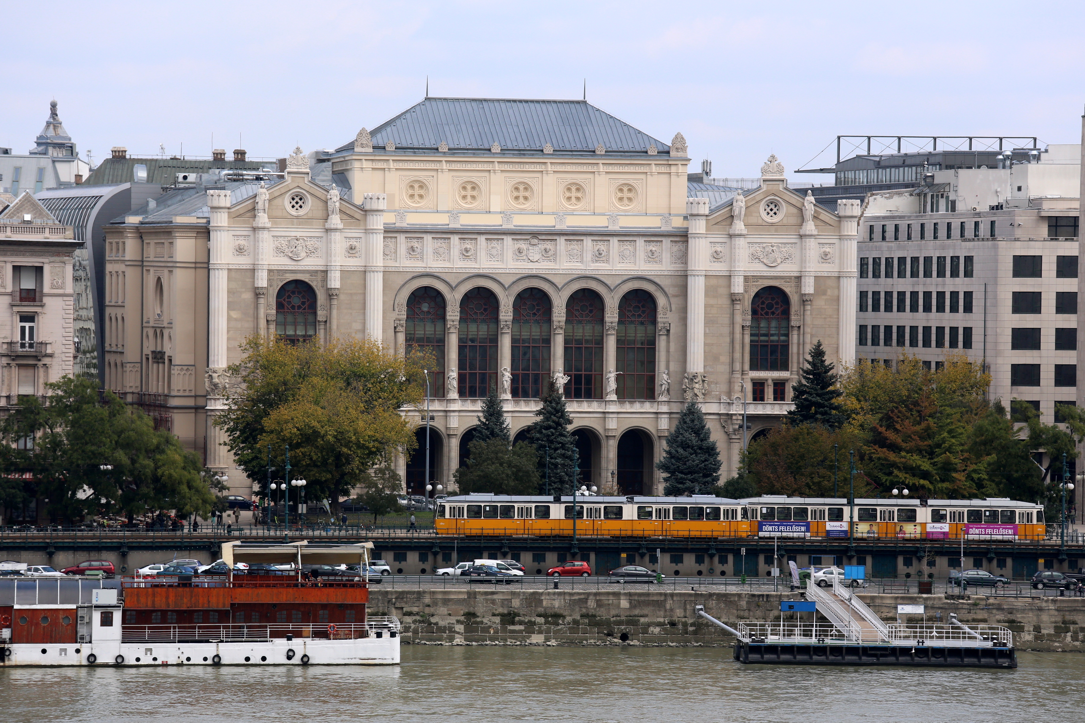 Pesti Vigadó This is a photo of a monument in Hungary. Identifier: 664